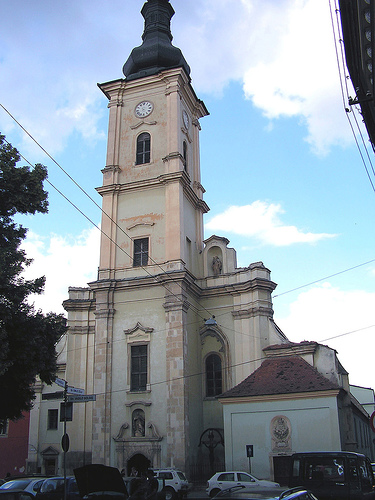 Cluj-Napoca, Biserica Franciscană (romano-catolică), Piaţa Muzeului nr.2